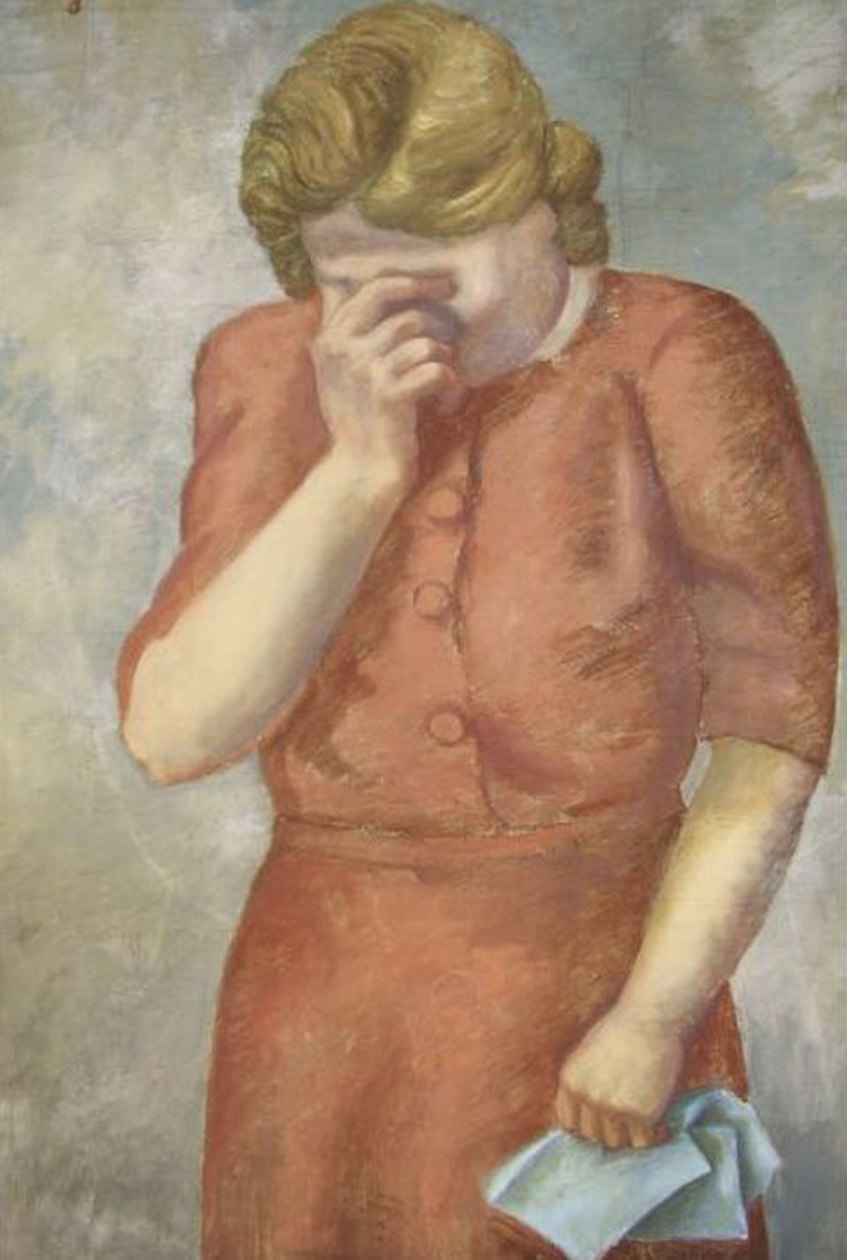 Peter Ludwigs (1888-1943) "Der Brief", um 1940, Öl auf Leinwand